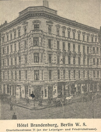 Ansicht des "Hotel Brandenburg" in Berlin, um 1905, Charlottenstraße 71.